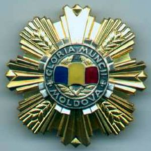 Ordinul Gloria Muncii